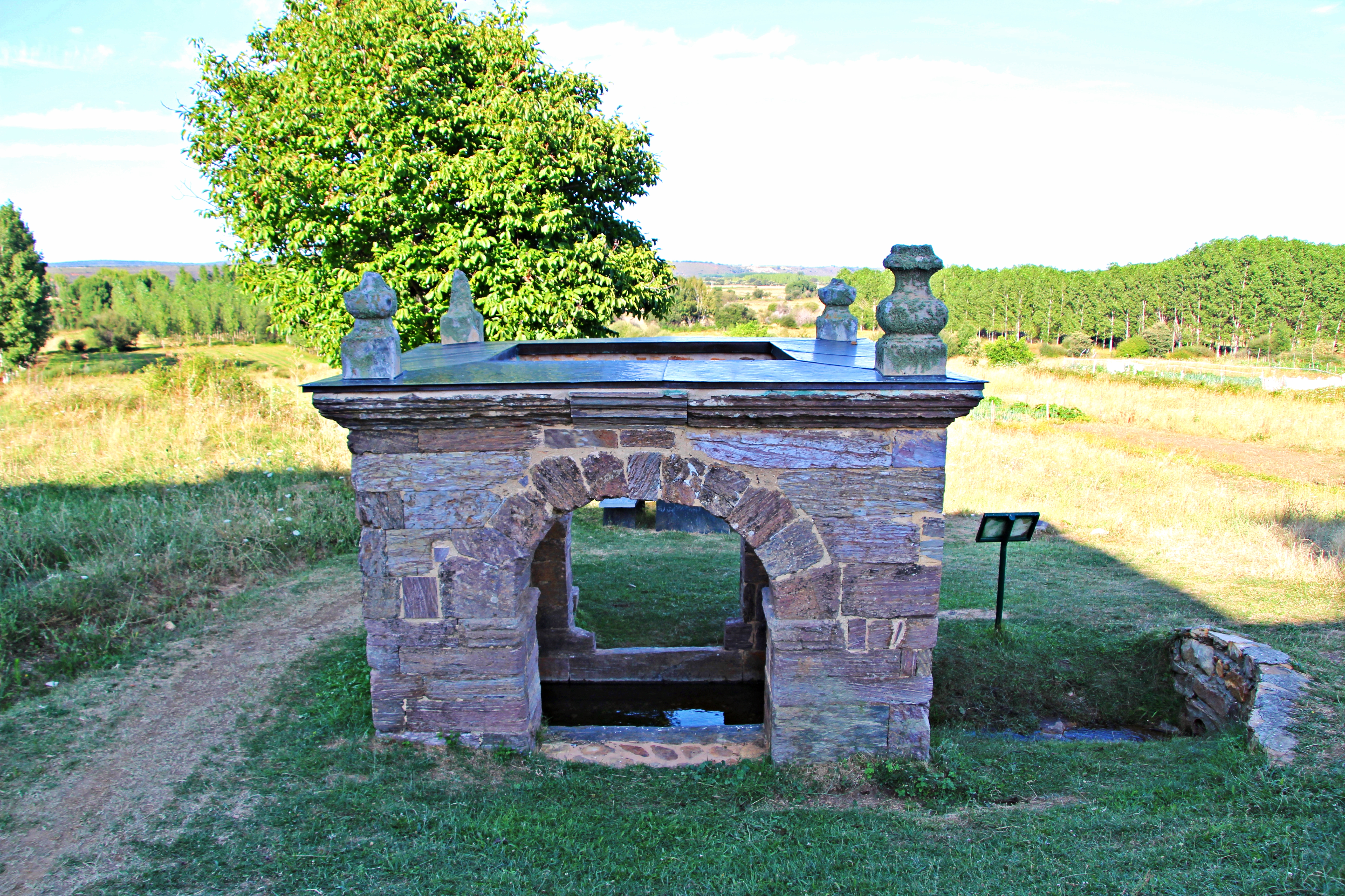 Tabuyo del Monte, La Maragatería, provincia de León. Se conoce como la Fuente del Cristo